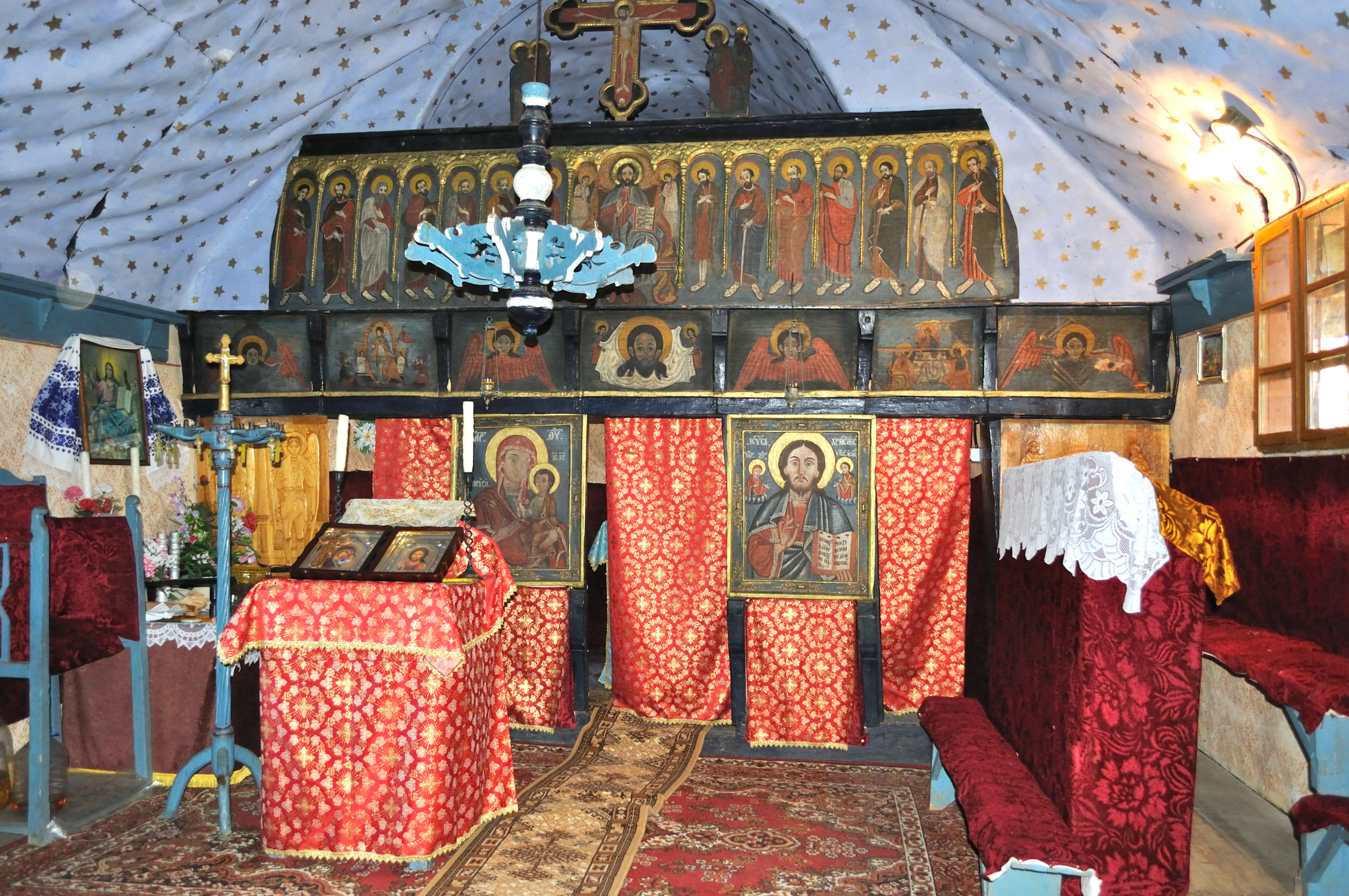 Biserica de lemn „Sfinții Arhangheli” din Fânațele Silivașului, județul Bistrița-Năsăud